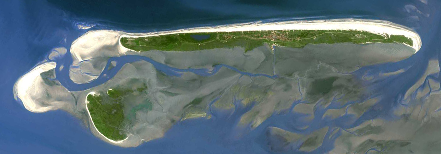 Insel Juist. Aufnahme von Landsat 7 (NASA) aus ca. 700 Kilometern Höhe.